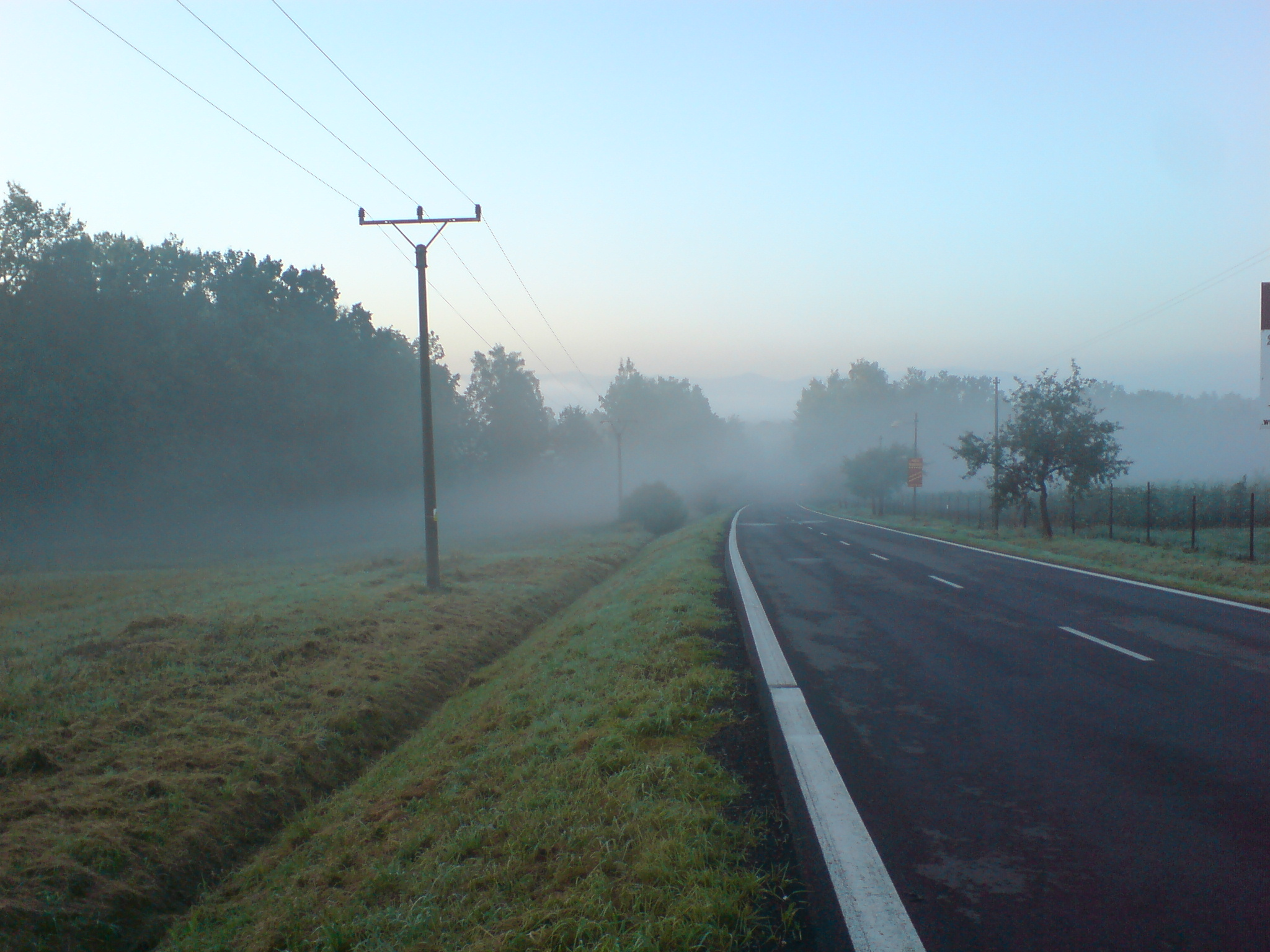 Silnice II/474 směr z Havířova, Životic do Těrlicka